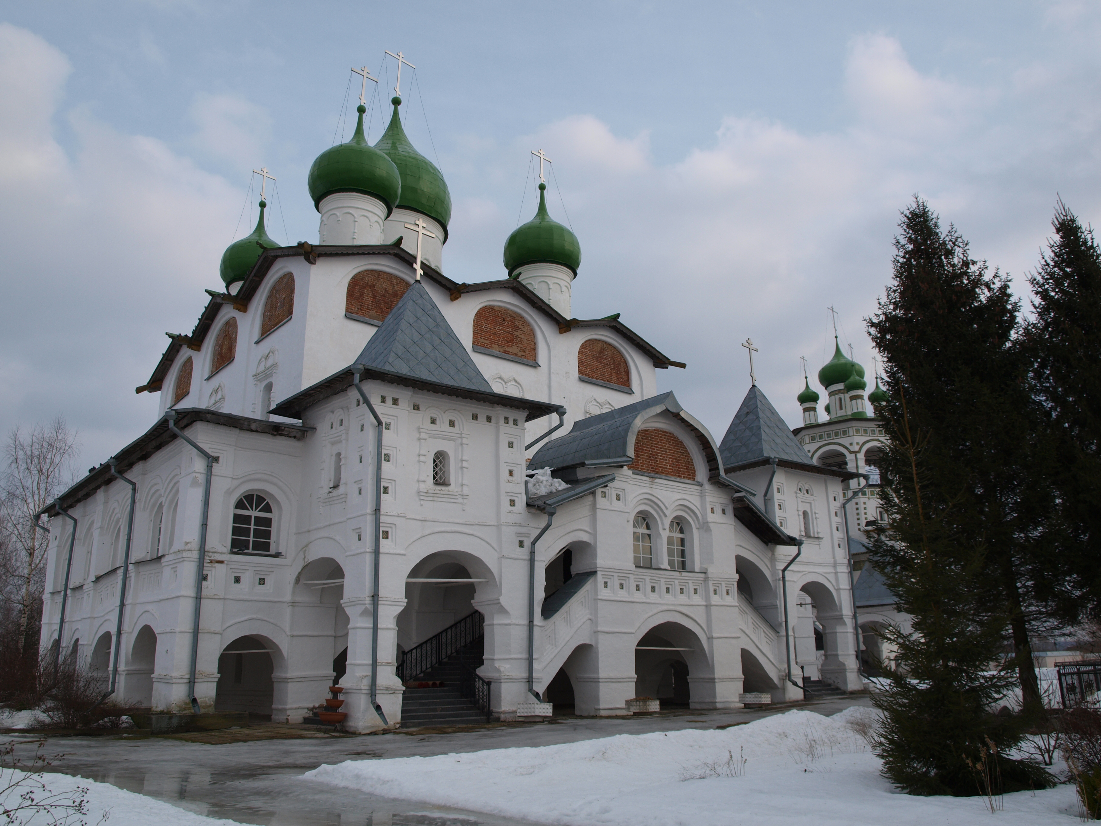 Собор Никольский: Вяжищи, Новгородский район, Новгородская область